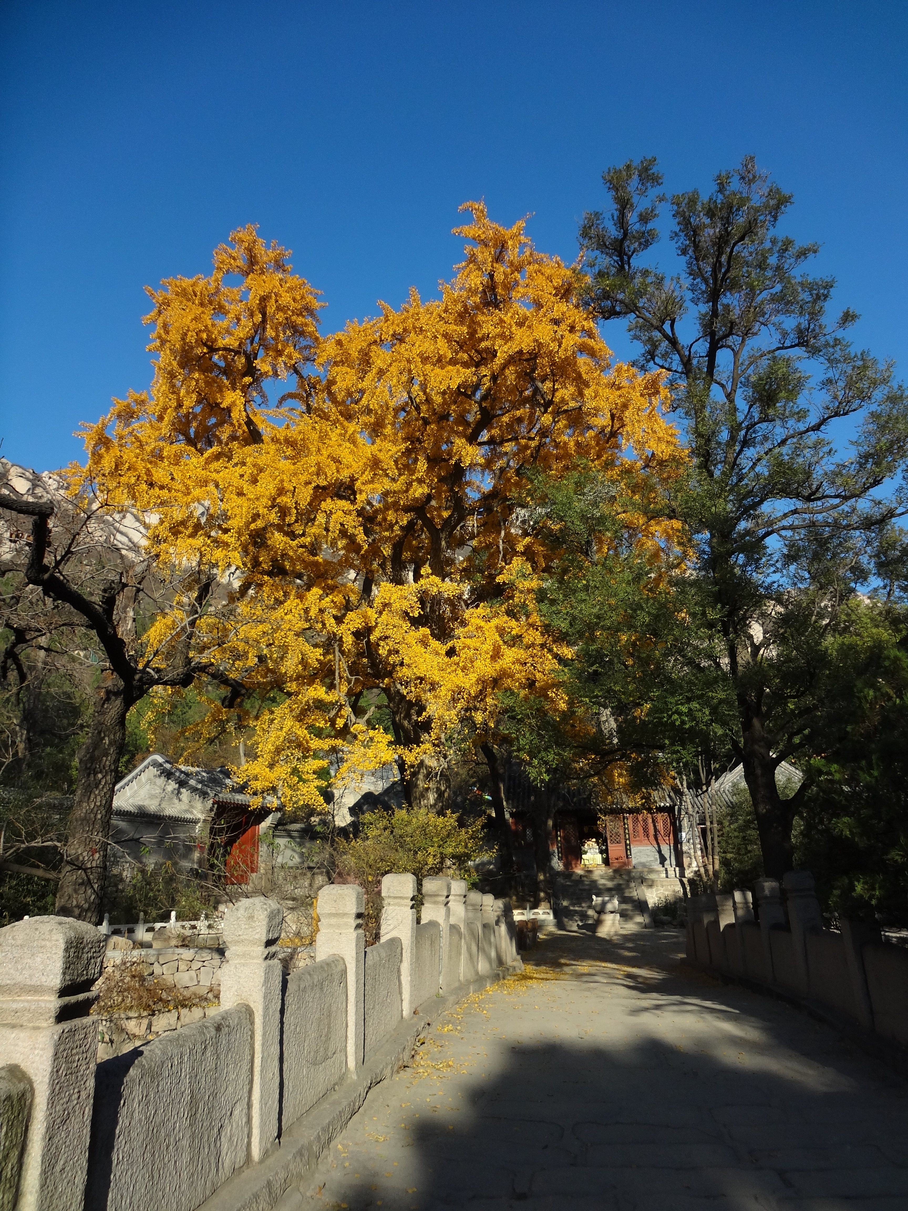 龙泉寺千年银杏